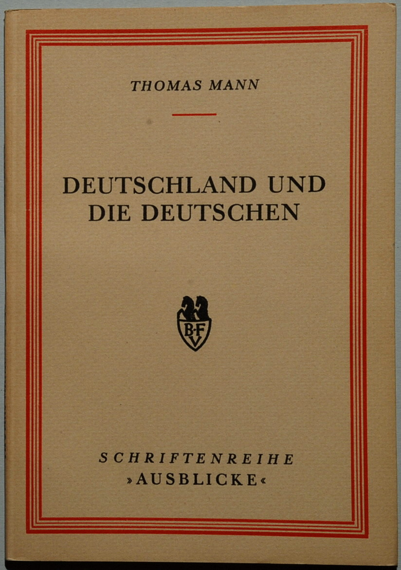 Thomas Mann: Deutschland und die Deutschen. (Vortrag, gehalten in der Library of Congress zu Washington im Juni [recte Mai] 1945.) Stockholm: Bermann-Fischer 1947, 40 Seiten; Erstausgabe (Potempa G 922.2, Bürgin I 74, Wilpert/Gühring² 99) Orig.-Broschur 22,5 x 15,5 cm